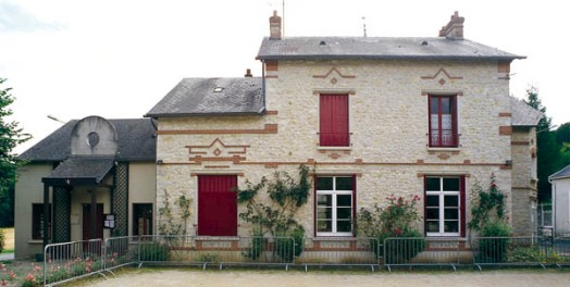 Mairie-Ecole de Saint-Cyr-la-Rivière